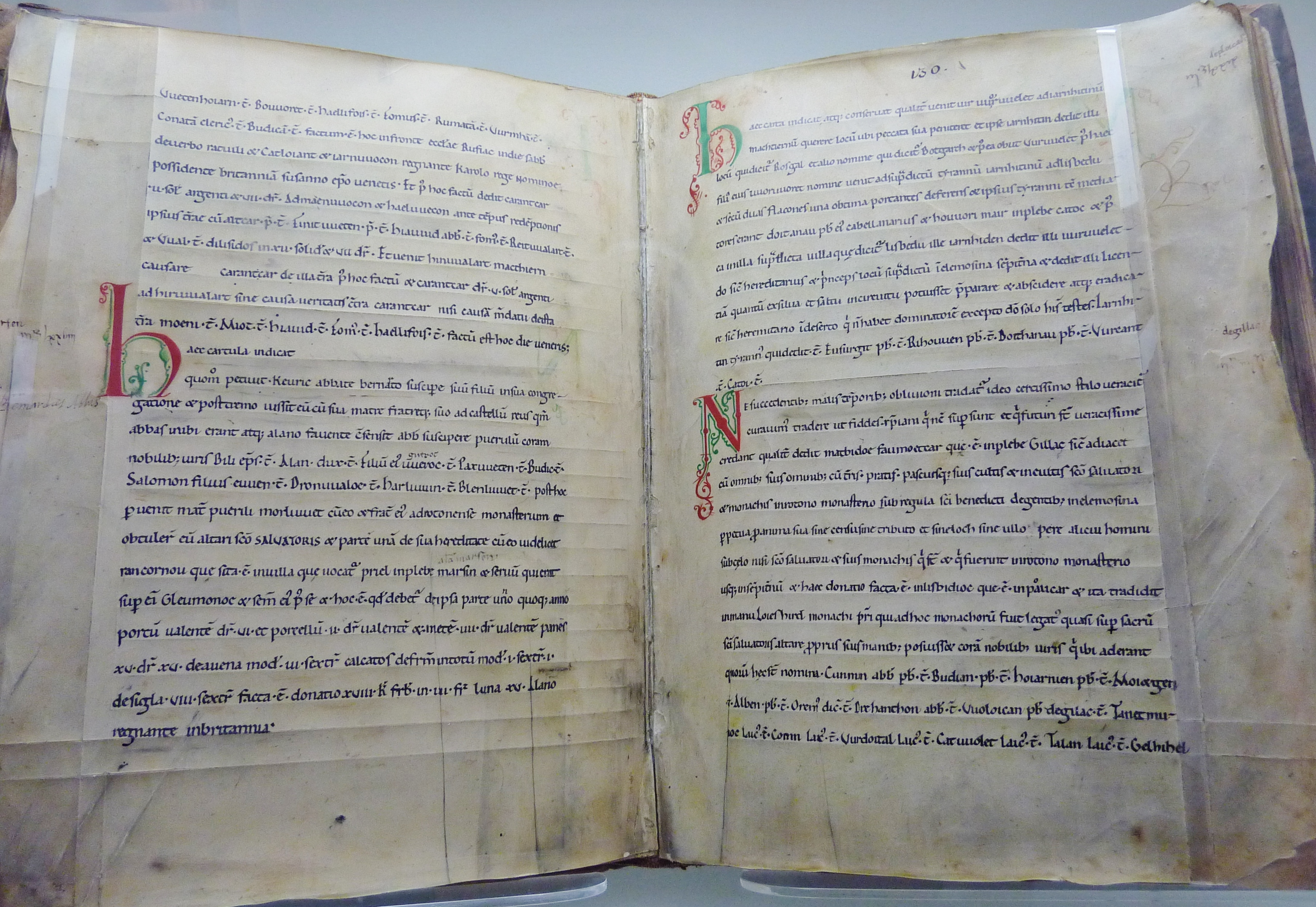 Double page du Cartulaire de l'abbaye Saint-Sauveur de Redon (8e au 11e siècles). Retranscrit au 11e siècle, il dresse un riche panorama des nombreuses chartes retraçant les nombreuses acquisitions des biens fonciers de l'abbaye et contient de nombreuses informations quant aux modes de gestion du sol (Musée de Bretagne, Rennes).